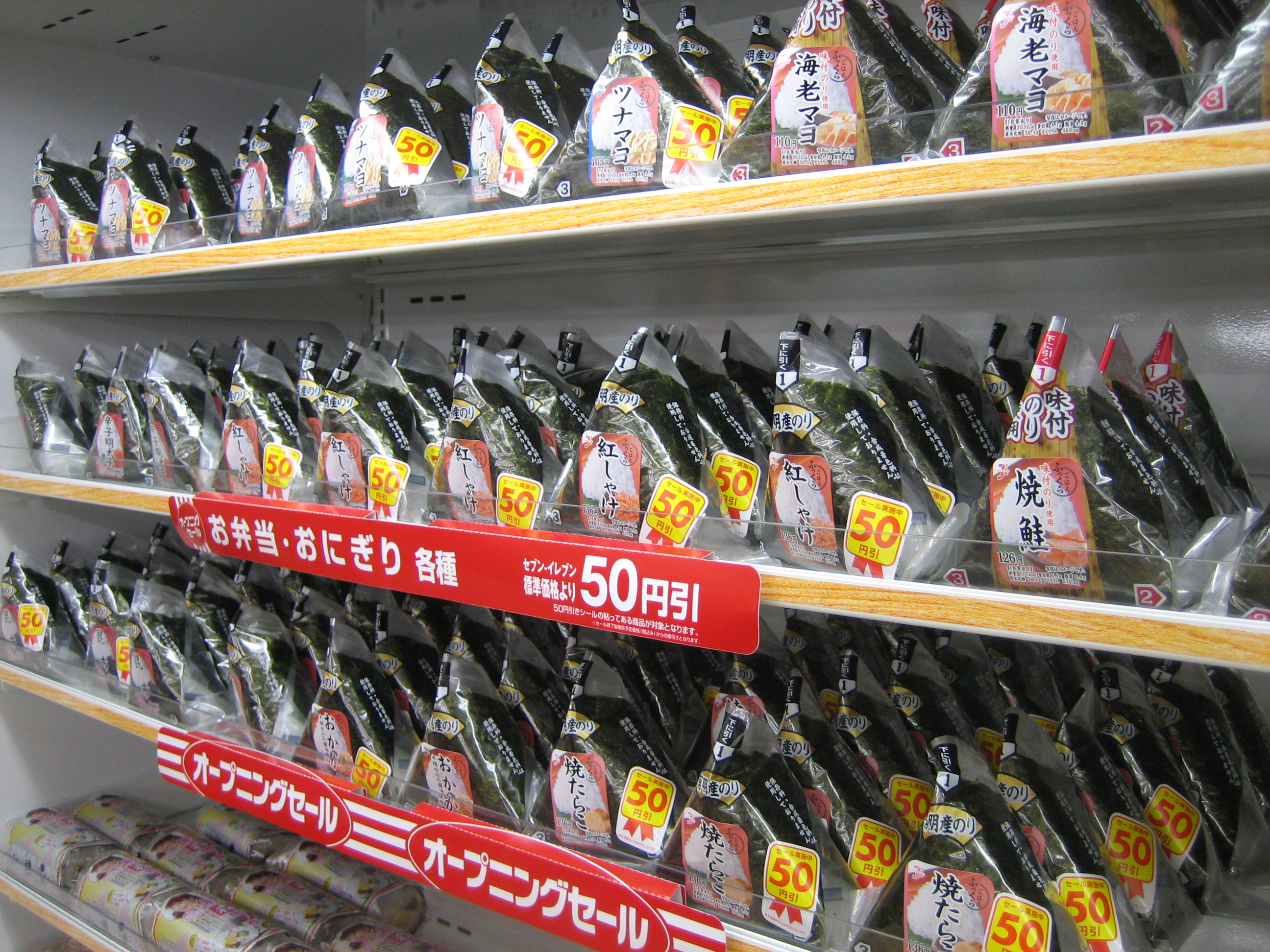 日本のコンビニエンスストアチェーンのセブンイレブンで販売されているおにぎり。